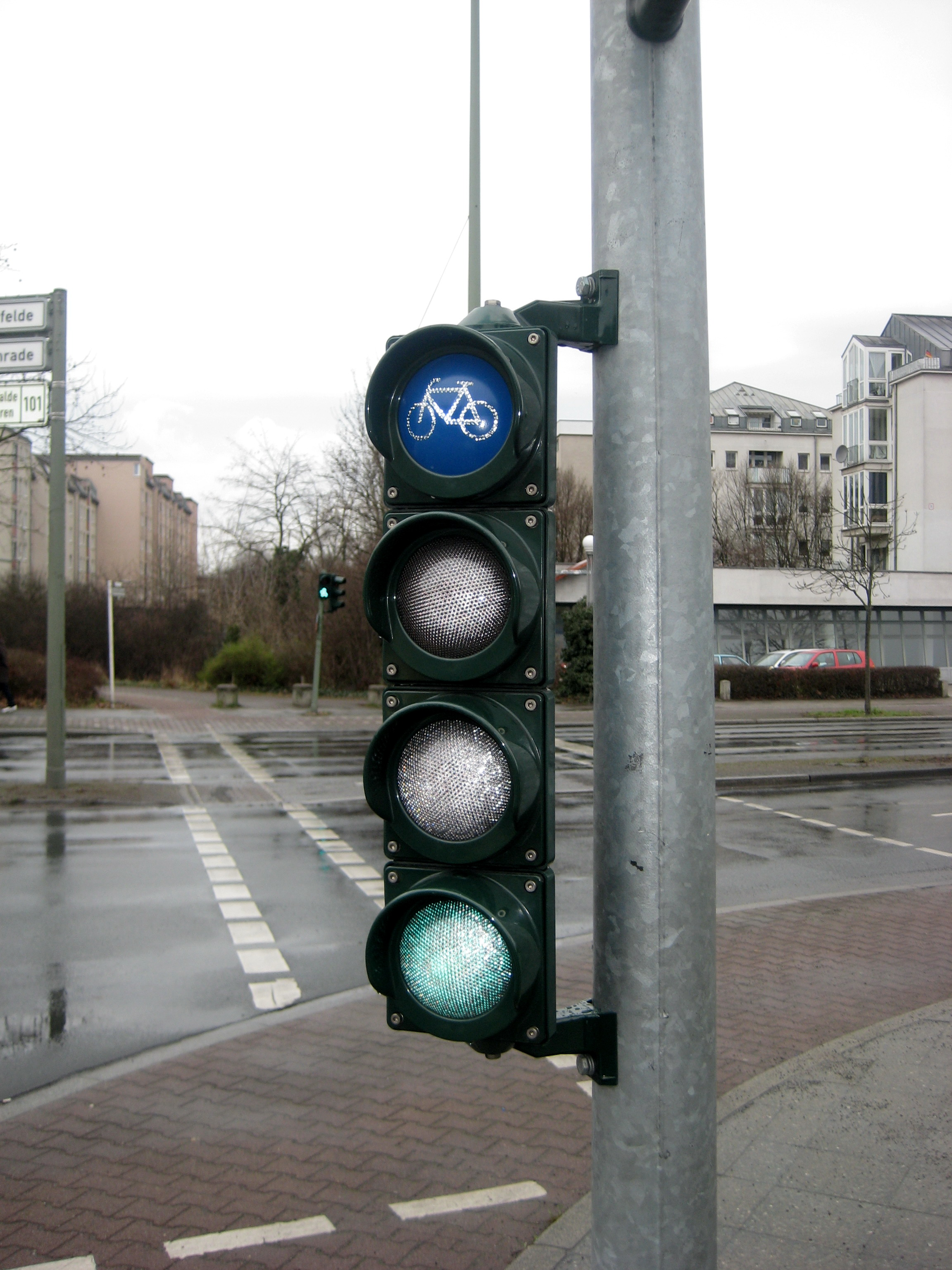 Велосипедный светофор в Берлине